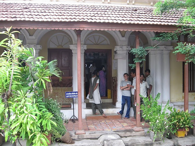 புதுவையில் மகாகவி பாரதியார் வாழ்ந்த இல்லம் தற்போது அரசால் நினைவில்லமாக மாற்றபட்டுள்ளது. அதன் வாயிலிலிருந்து ஒரு காட்சி.